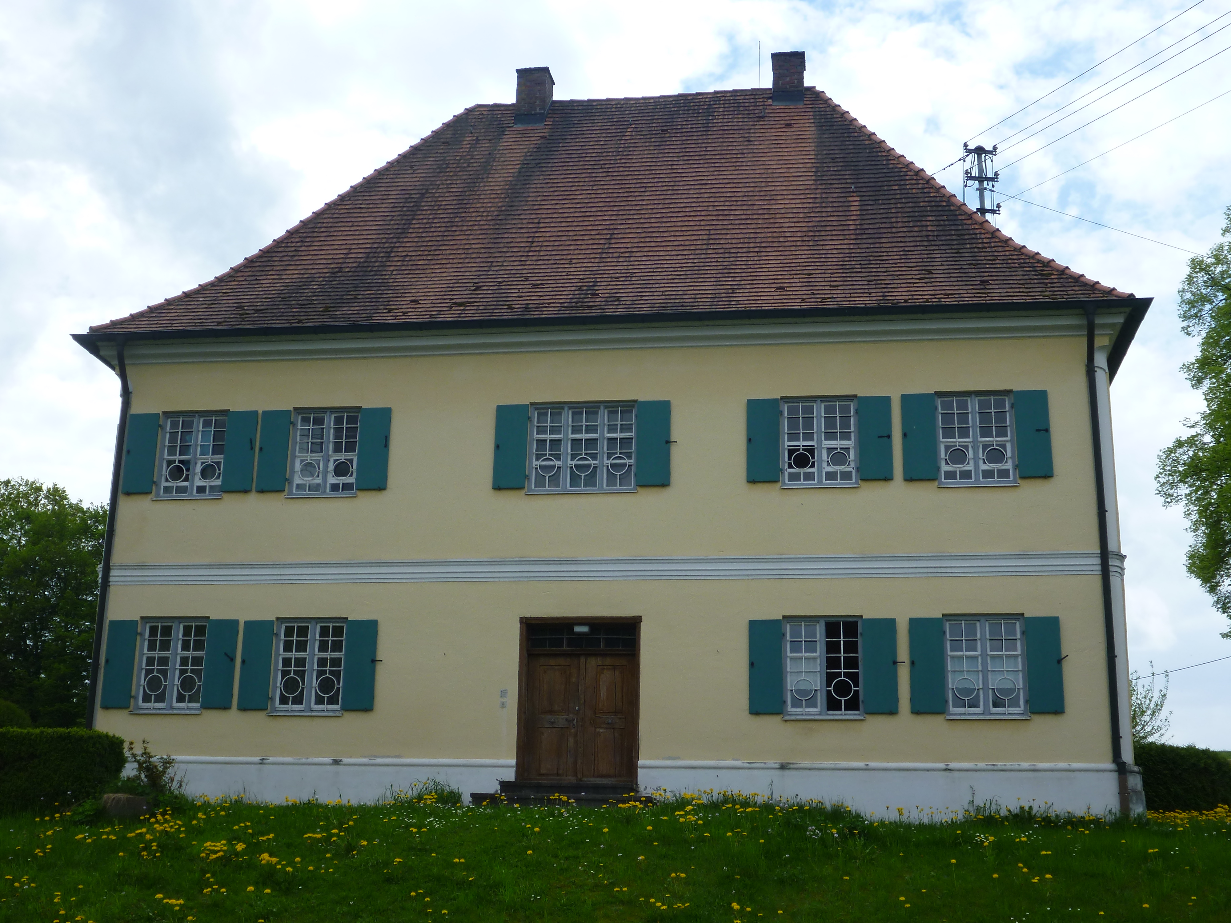 Walmdachbau, nach Mitte 18. Jahrhundert, Frontseite